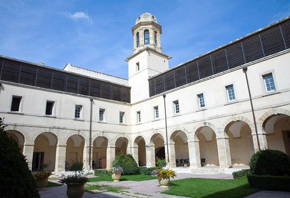 Faculté de droit de Montpellier (Bâtiment 1), Université Montpellier 1